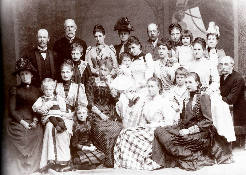 Maria Josè di Braganza, la moglie di Carlo Teodoro, al centro della foto, in vacanza con i figli a Merano nel 1890: in braccio ha il piccolo Franz Joseph, a destra, il bimbo con la frangetta, Ludwig Wilhelm, a terra, con la gonna scozzese, la figlia Sophie. Accanto a Maria Josè c'è la sorella Maria Teresa, la terza moglie dell'Arciduca Carlo Ludovico, il signore in terza fila con i baffi bianchi (ci sono anche le sue figlie). Si riconoscono inoltre: la seconda in prima fila, l'Arciduchessa Maria Giuseppina, con in braccio il piccolo Karl, e Stefania del Belgio(vedova da un anno) con la figlia Erzsi.